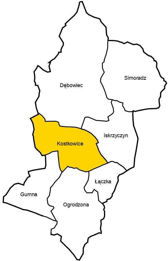 Sołectwo Kostkowice na mapie gminy